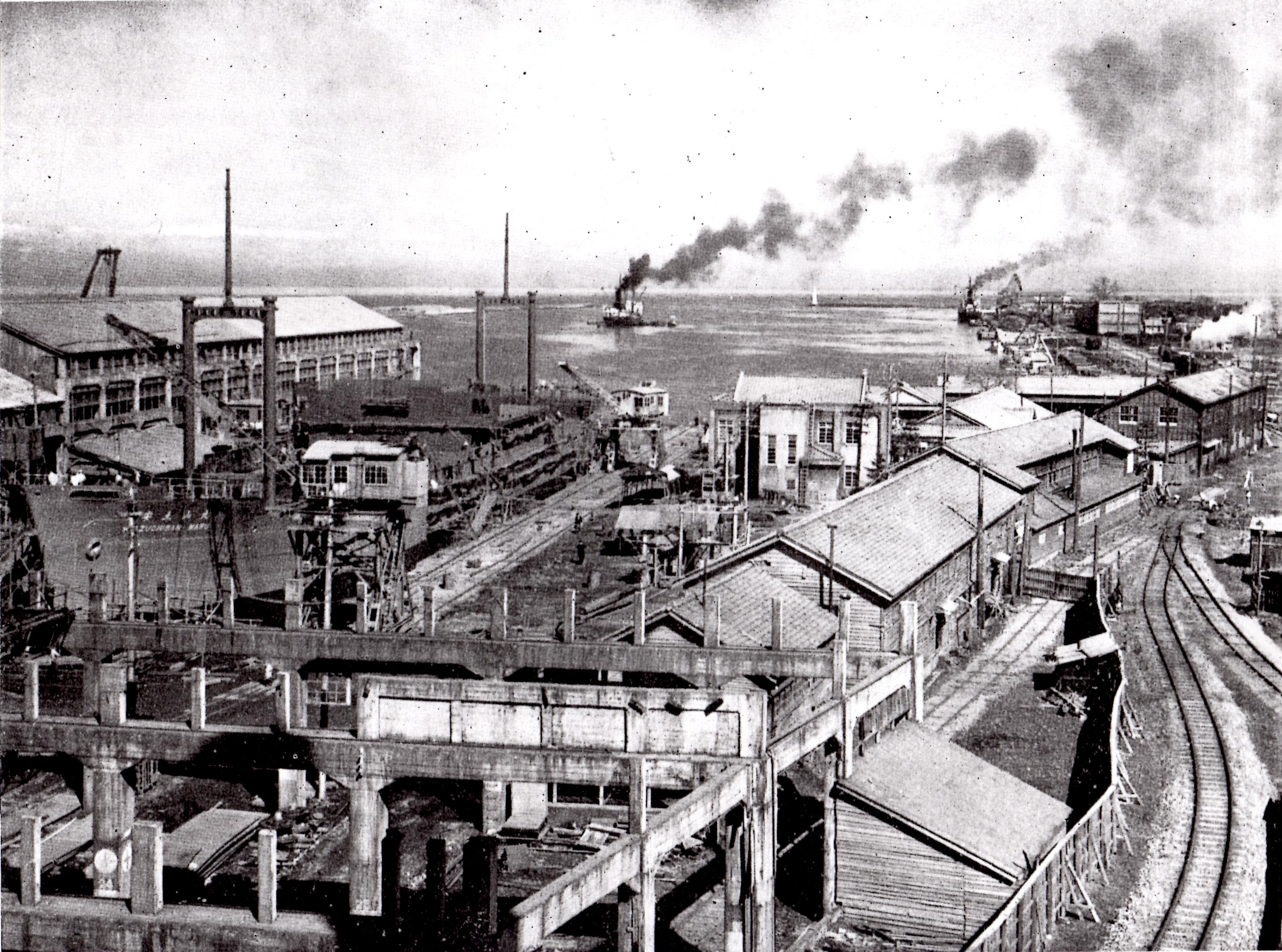 原題：「富山市岩瀬港と日本海ドツク」。